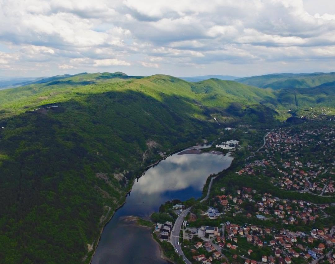 Панчарево-Main